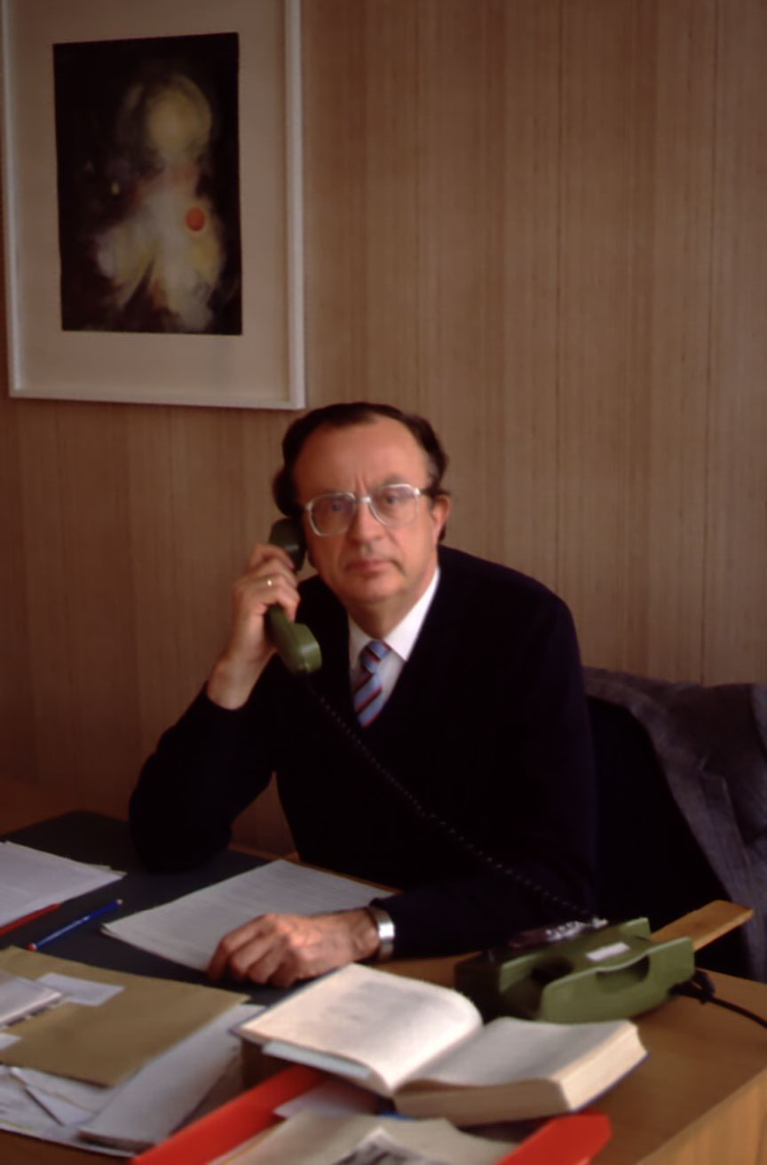 Weltraumforscher. Ehemaliger Leiter der Sternwarte und des Planetariums Bochum.